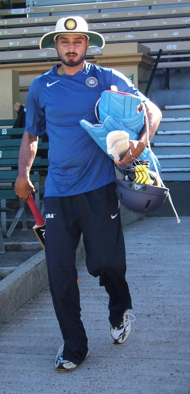 Harbhajan Singh at Adelaide Oval